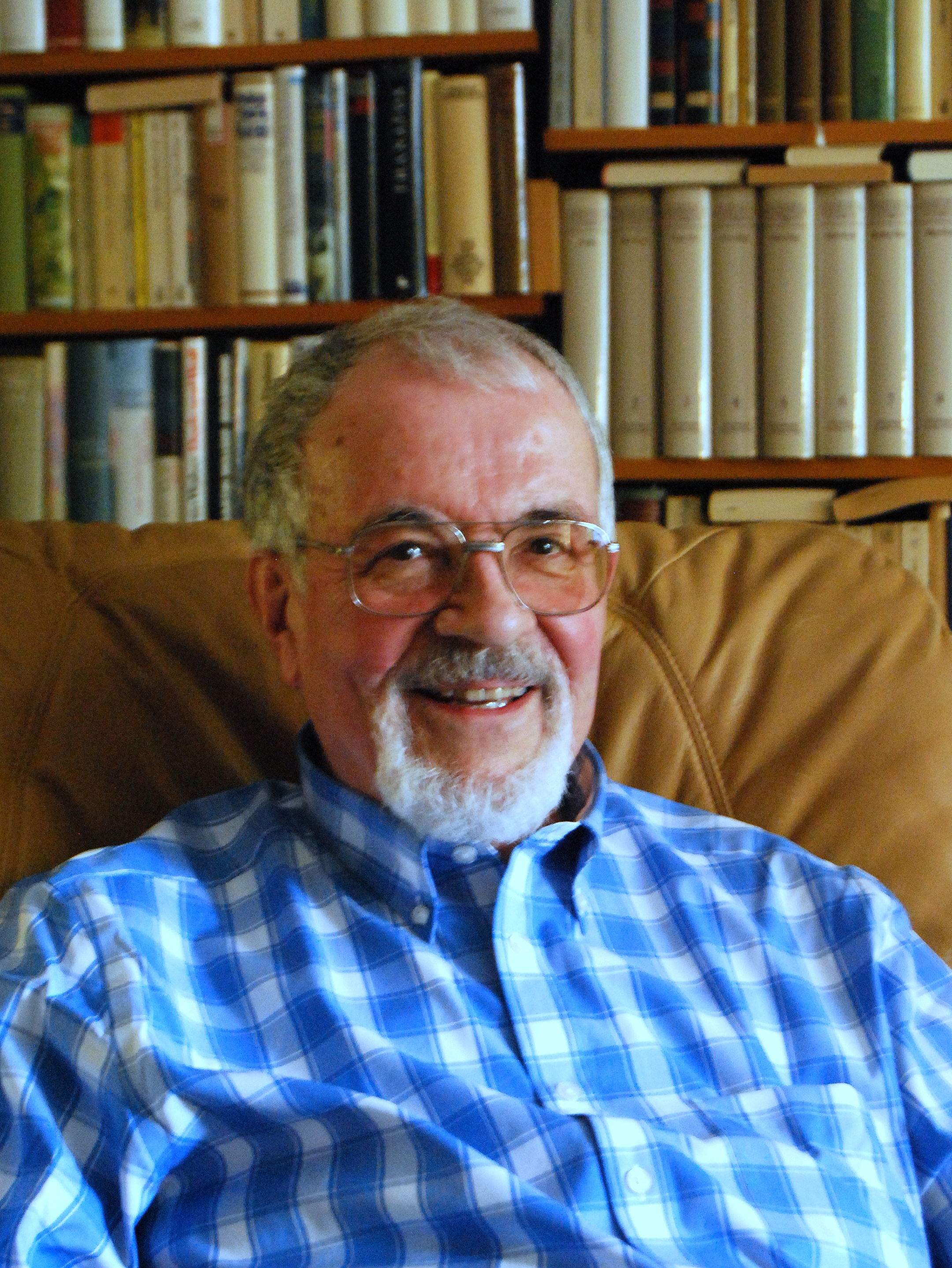 Prof. Dr. Winfried Frey